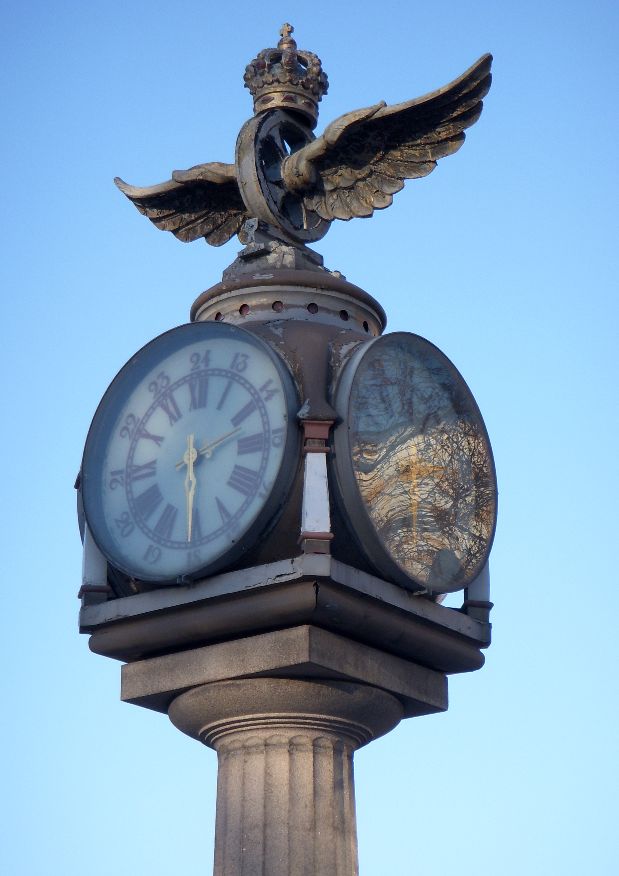 Gamla SJ-klockan från centralen i Stockholm